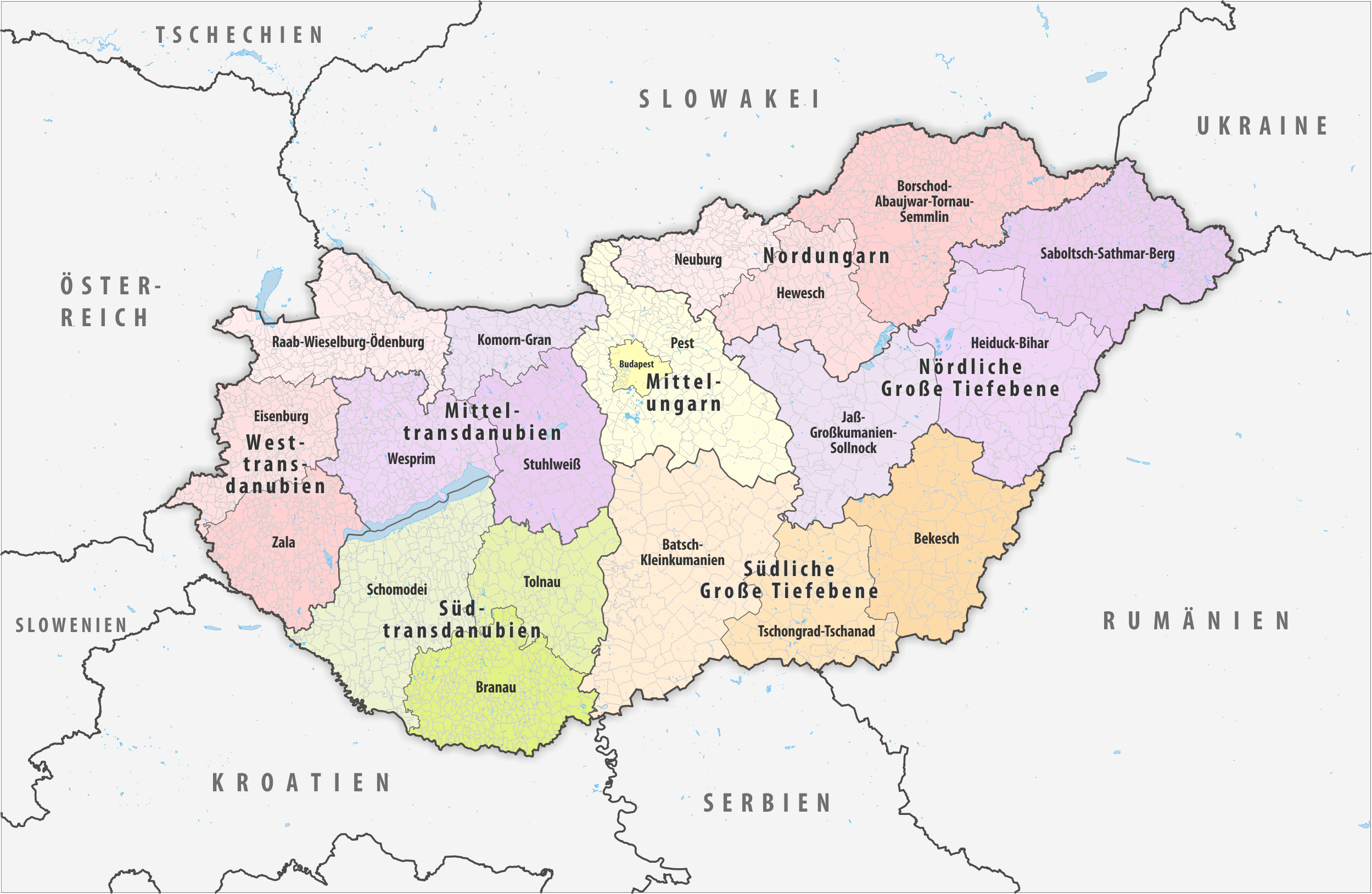 Administrative Gliederung Ungarns